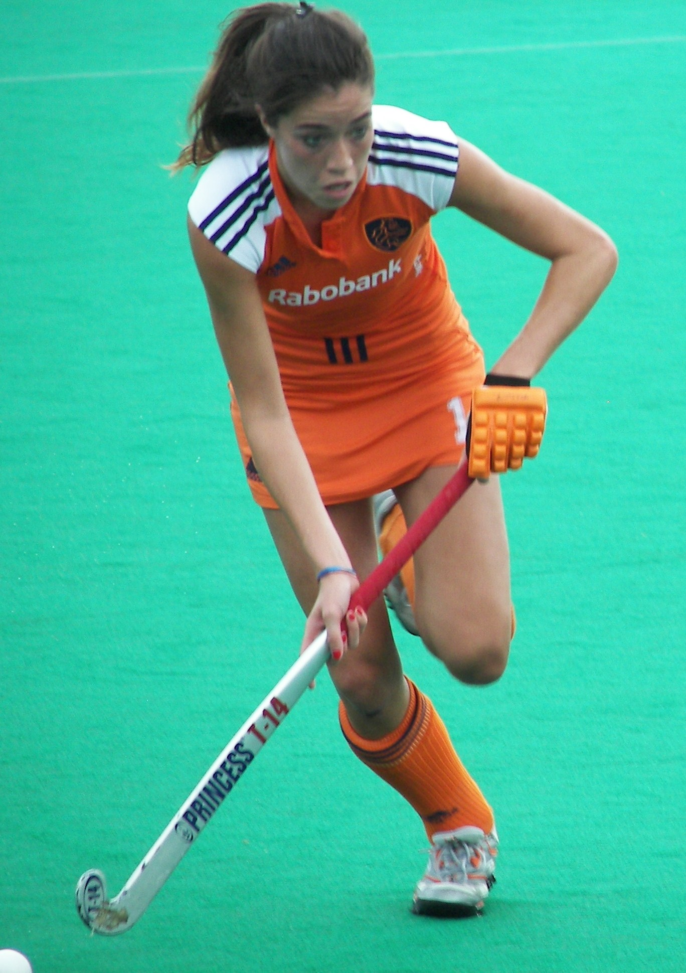 Naomi van As